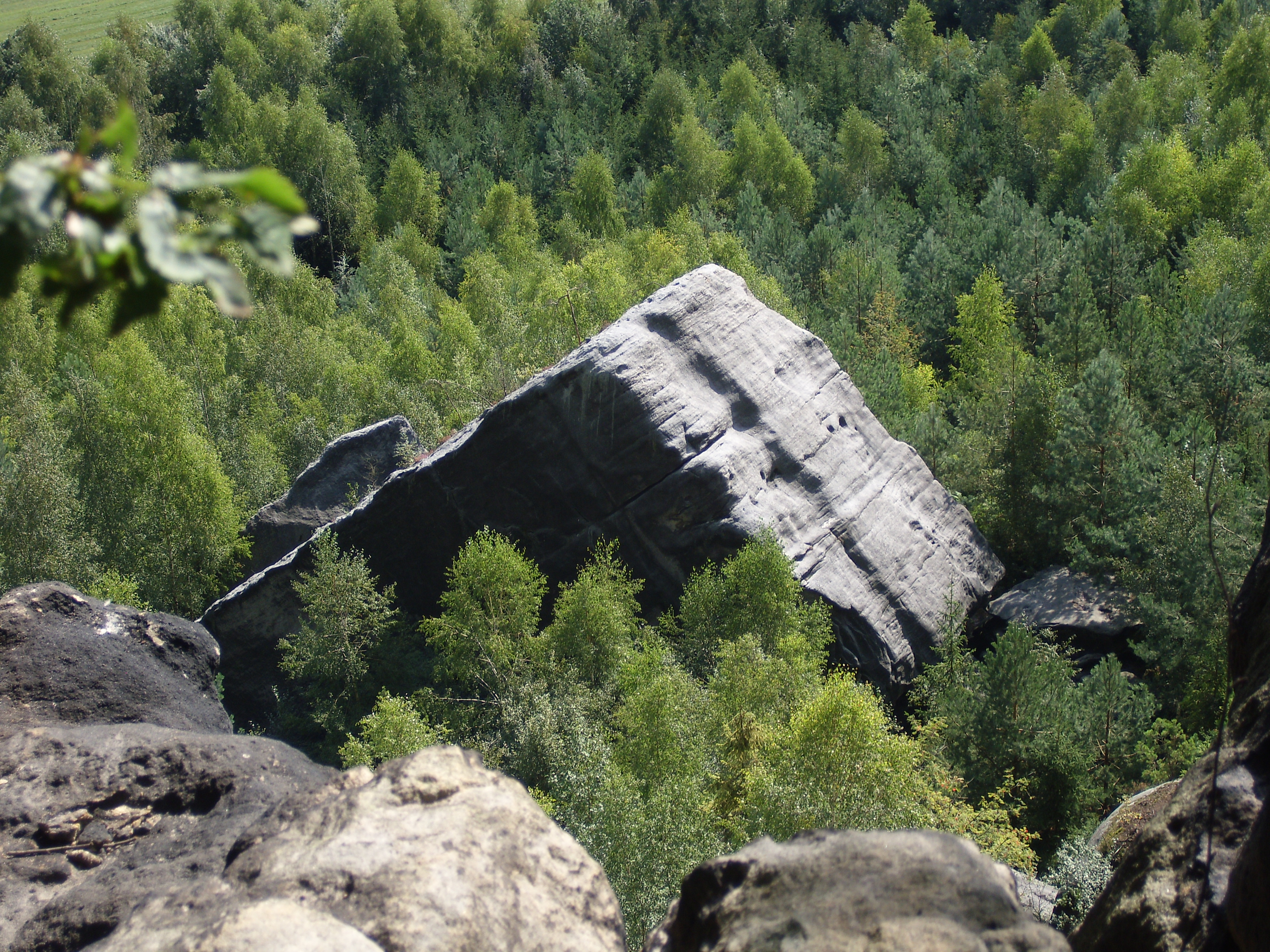 Die Klamotte, ein Felsabsturz nahe der Weißen Wand, ander Ostseite des Pfaffensteins